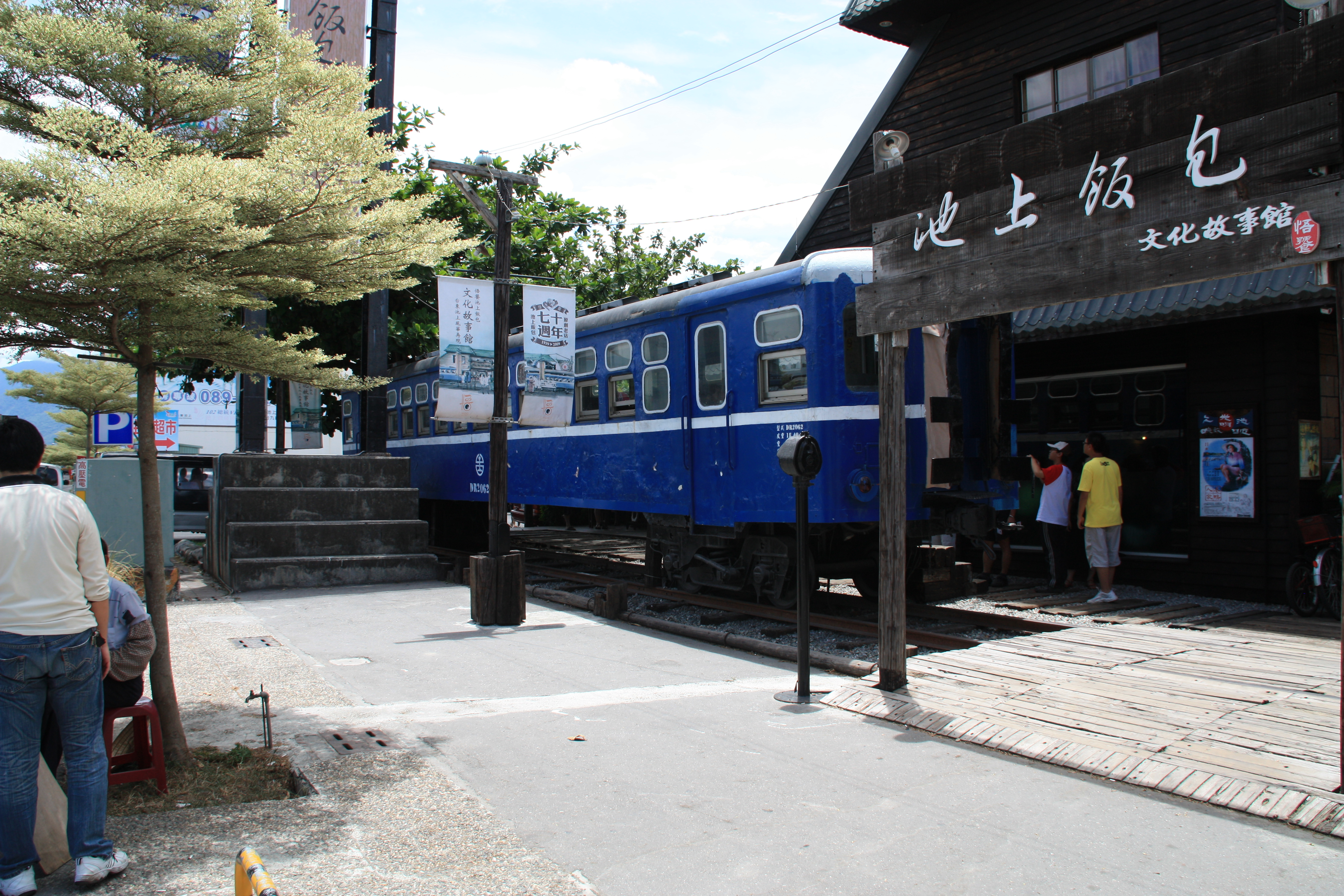 位於台東縣池上鄉悟饕池上飯包文化故事館的DR2062柴油客車拖車